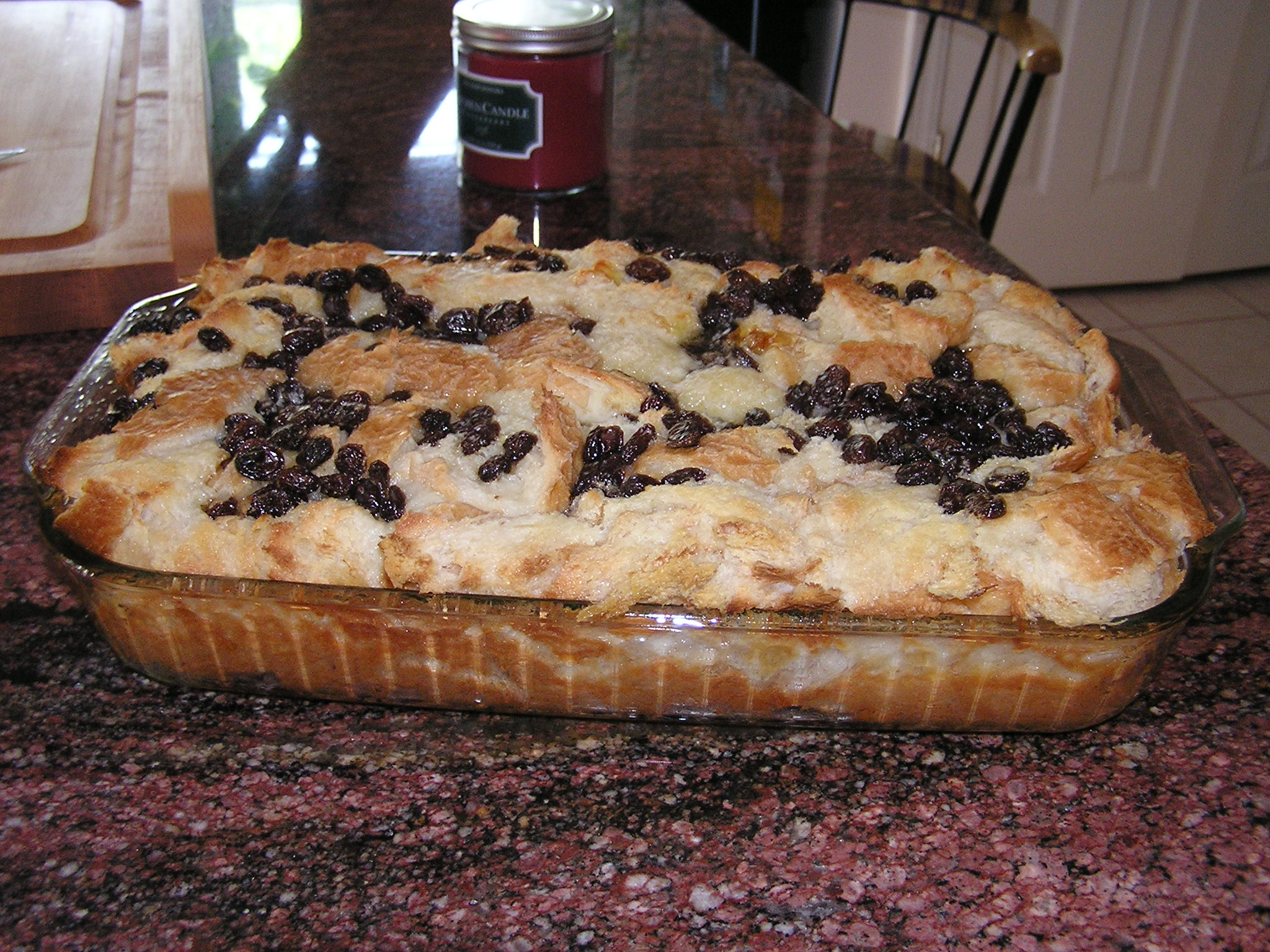 bread pudding